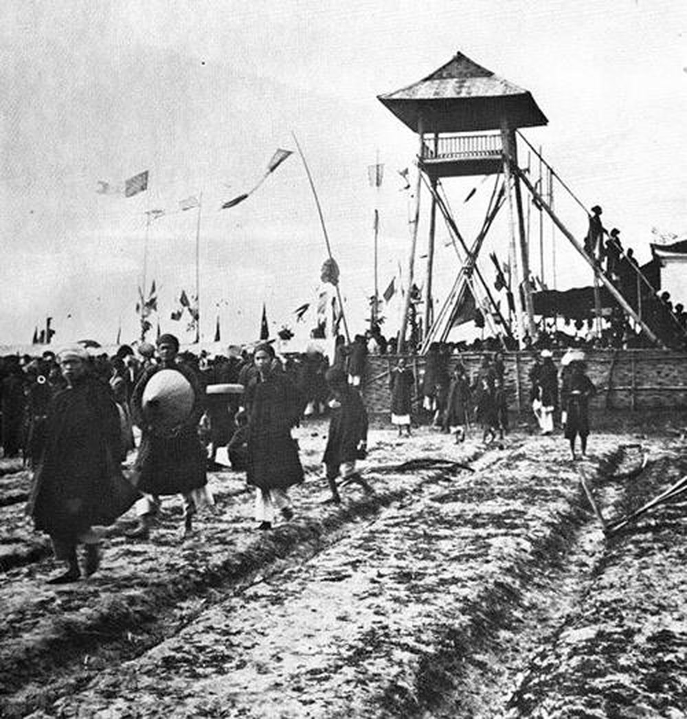 Các thí sinh đi vào trường thi Nam Ðịnh (năm 1897), họ phải tự làm lều và đặt chõng để viết bài.